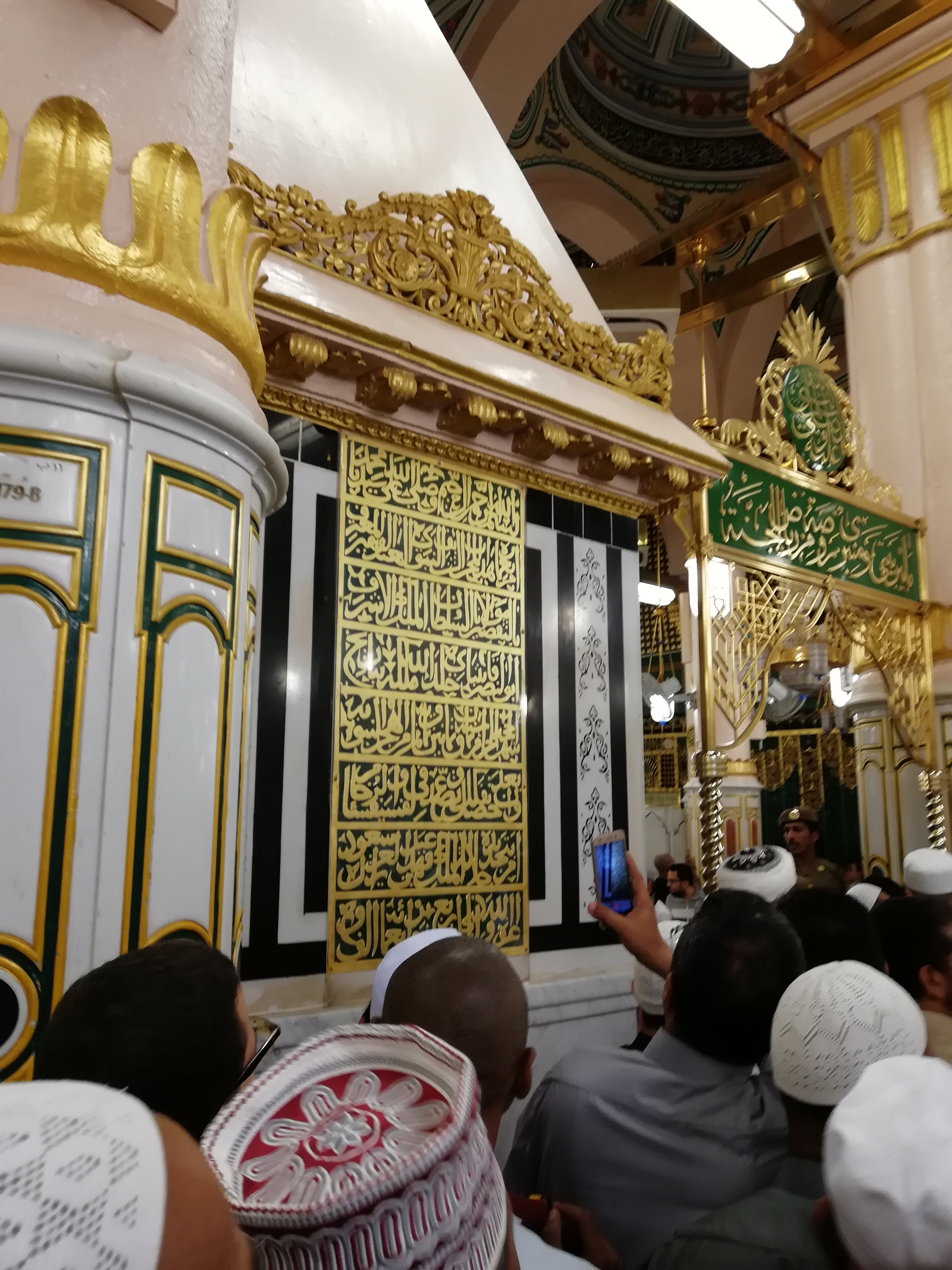 al-Madinah al-Munawarah Nabawi mosque Qaitbay plate near al-Rawda al-Sharifa